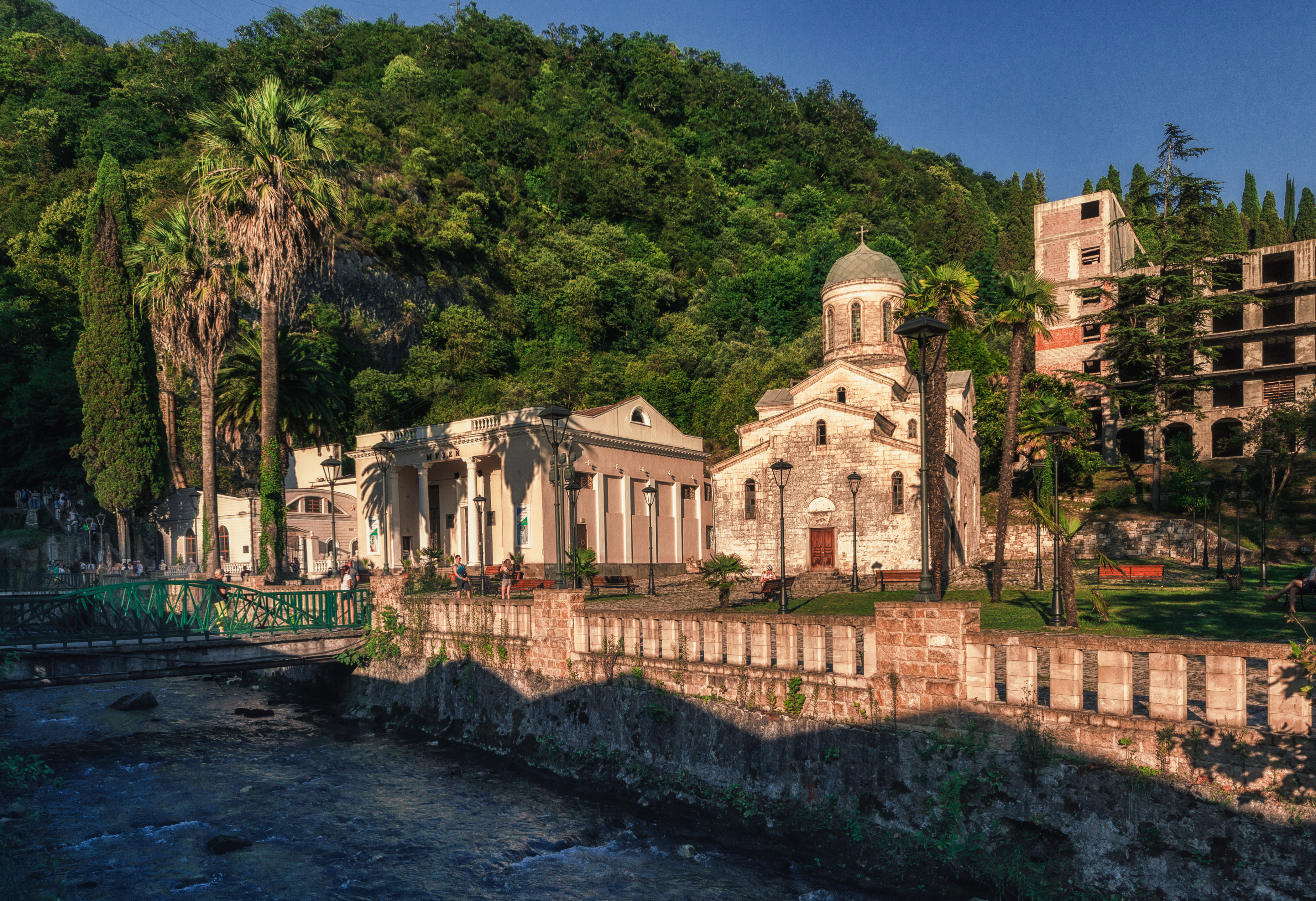 Новый Афон. Церковь Симона Кананита возле Псырцхинской ГЭС